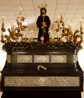 Jesús del Amor en su Sentencia